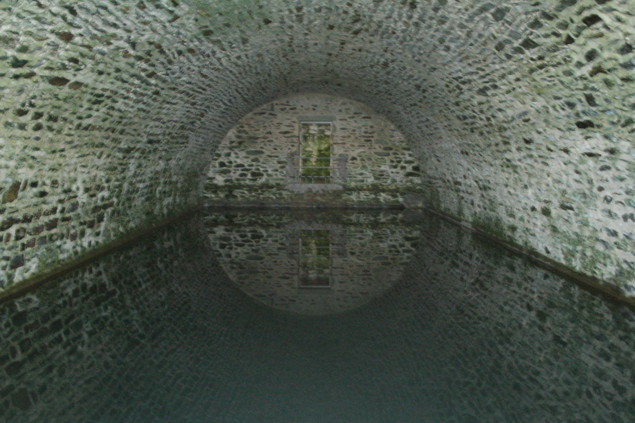 Interieur Belle fontaine à Belle-Ile